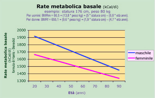 Rate metabolica basale: sesso, statura, peso, età